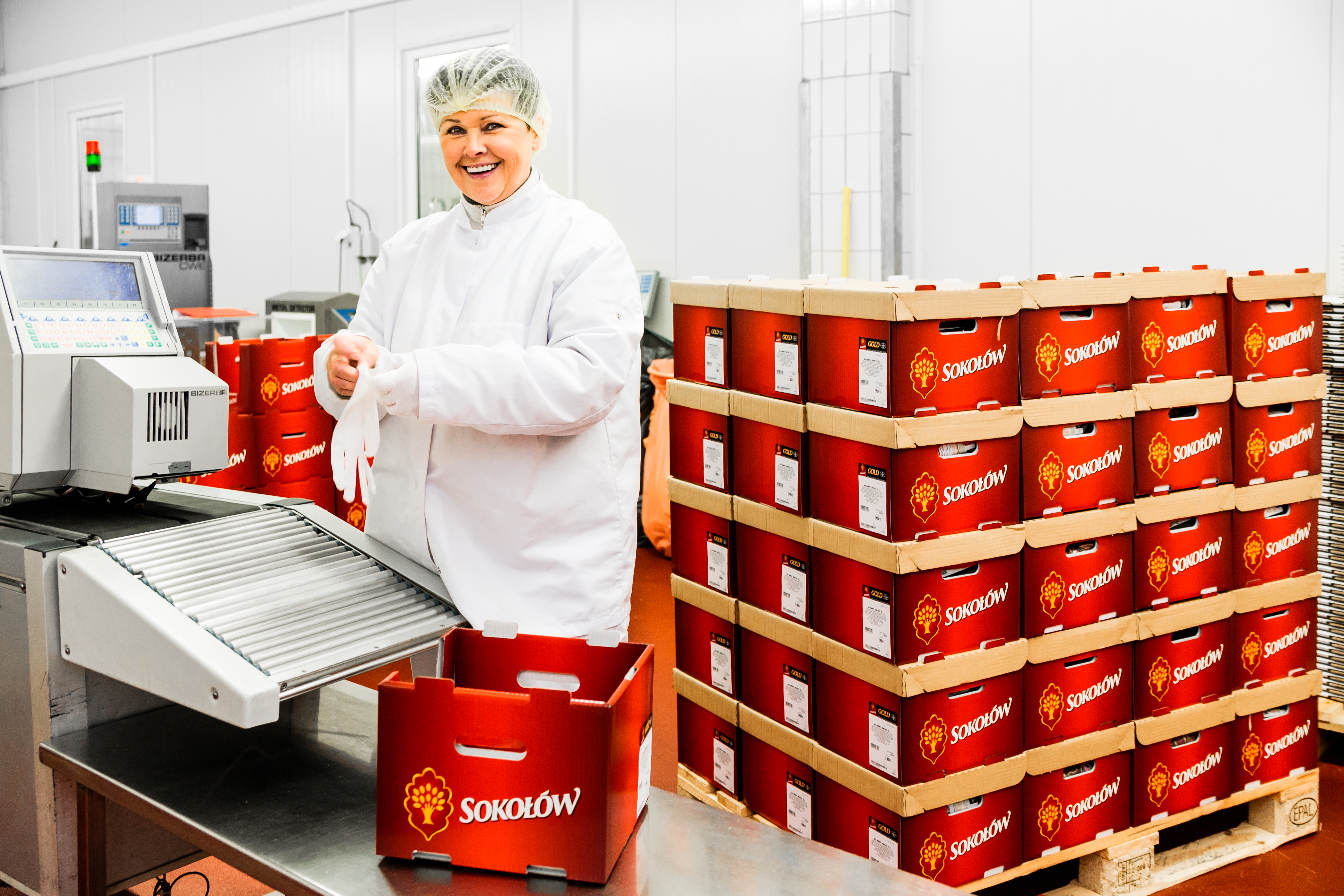 Sokołów SA Koło - produkcja, Jakub Młynek, Filip Śleziona